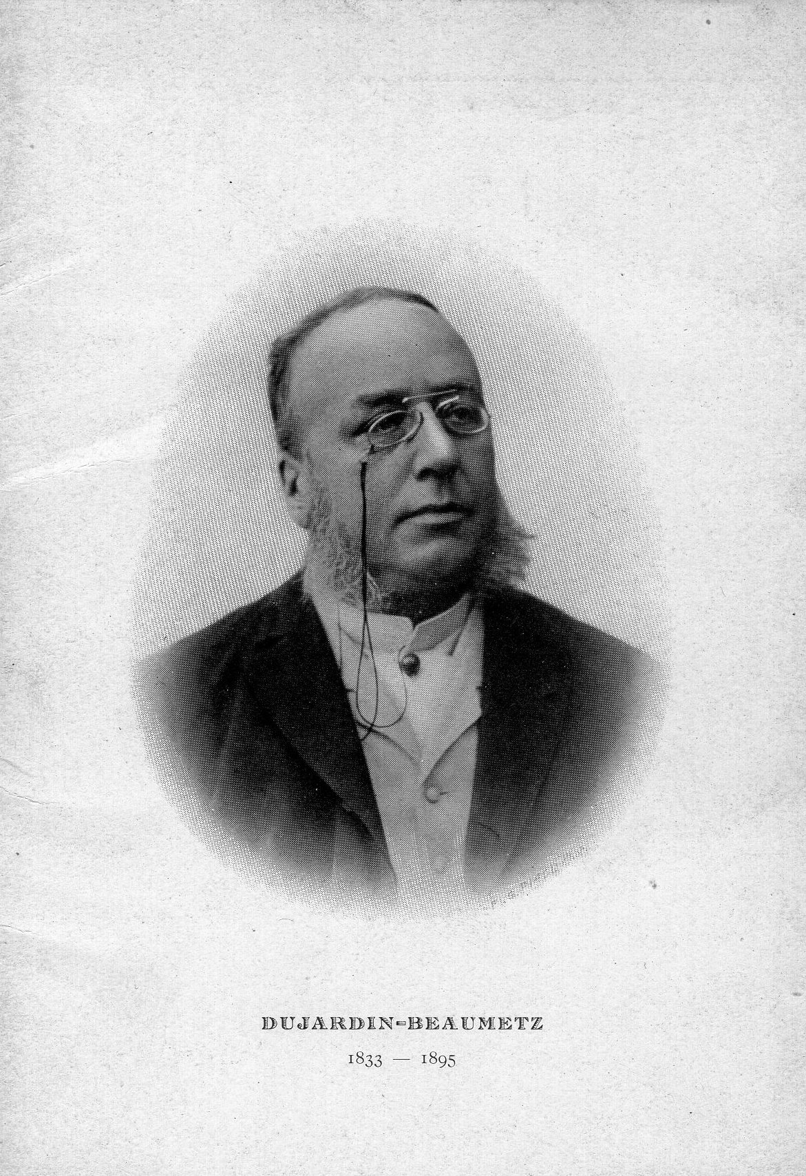 Foto di Edouard Dujardin-Beaumetz, biologo, membro fondatore della Société de pathologie exotique.